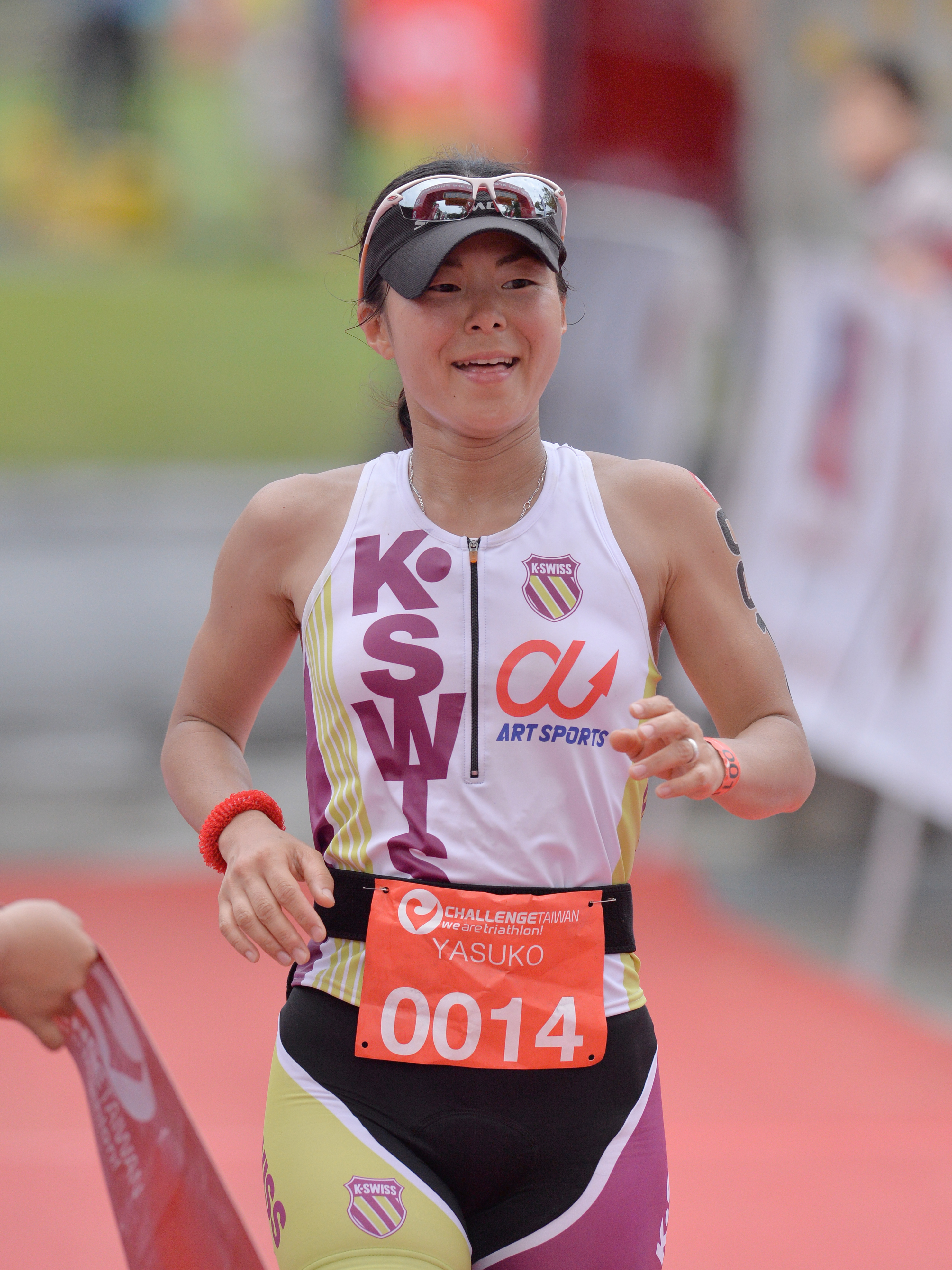 Yasuko Miyazaki running at Challenge Taiwan